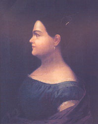 Leona Vicario de Quintana Roo, Mexican Independence figure